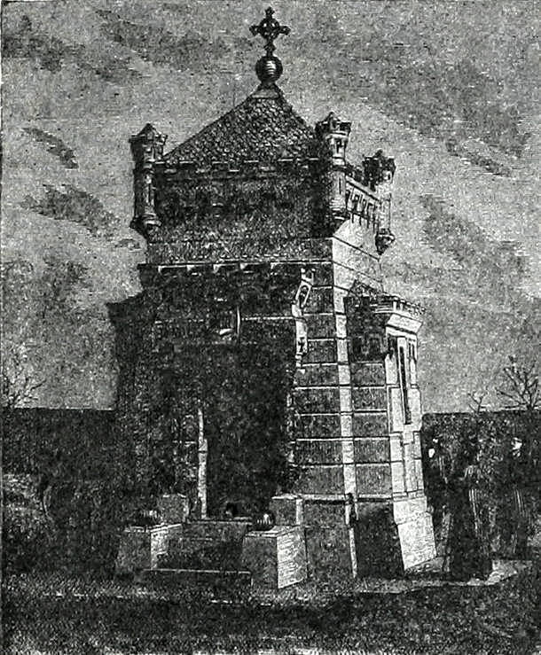 Это изображение было использовано для иллюстрирования статьи «Евдокимов, Николай Иванович, граф» опубликованной в девятом томе «Военной энциклопедии», который был издан книгоиздательским товариществом И. Д. Сытина в 1912 году в столице Российской империи городе Санкт-Петербурге.